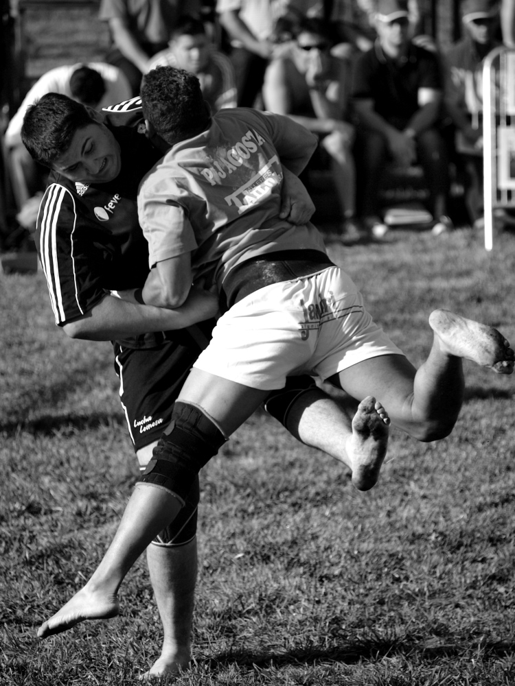 Corro de Lucha Leonesa Mata de Curueño León, España.